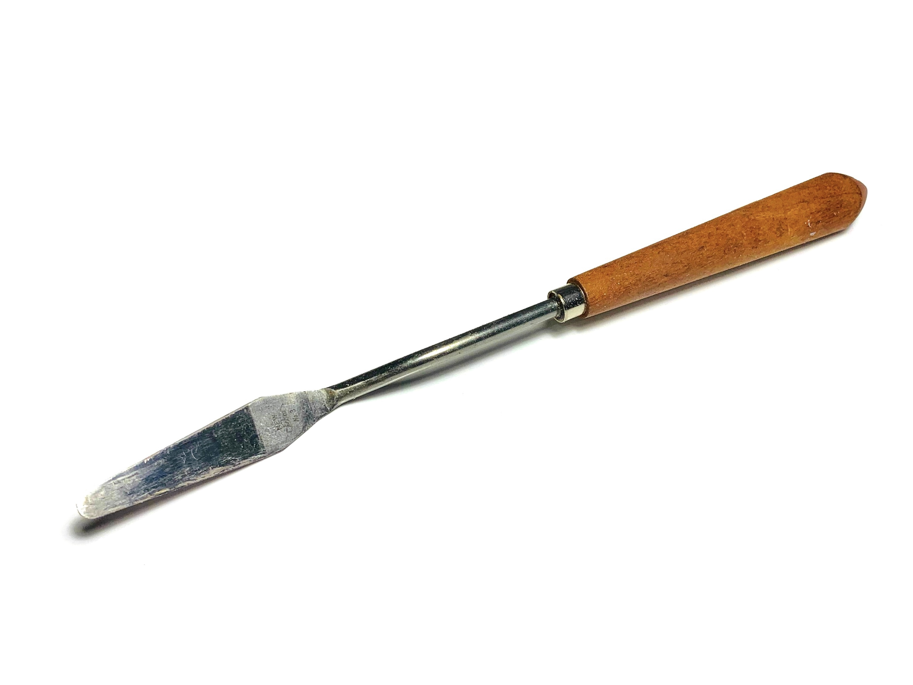 油絵に用いるペインティングナイフ（画材）